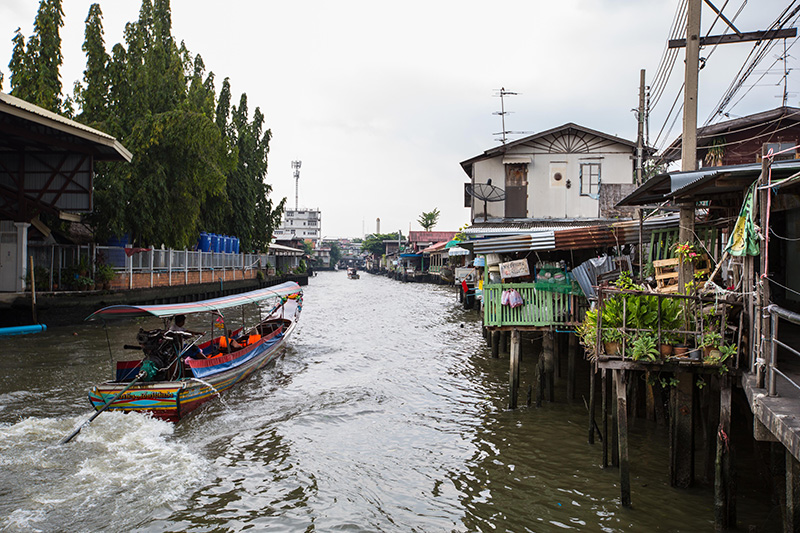 เป็นคลองธรรมชาติคลองหนึ่งที่ตั้งอยู่ระหว่างเขตบางกอกใหญ่และเขตบางกอกน้อย ที่มาของชื่อคลองมาจากที่ริมสองฝั่งคลองเป็นชุมชนชาวมอญเรียงรายกันไปตลอดแนว